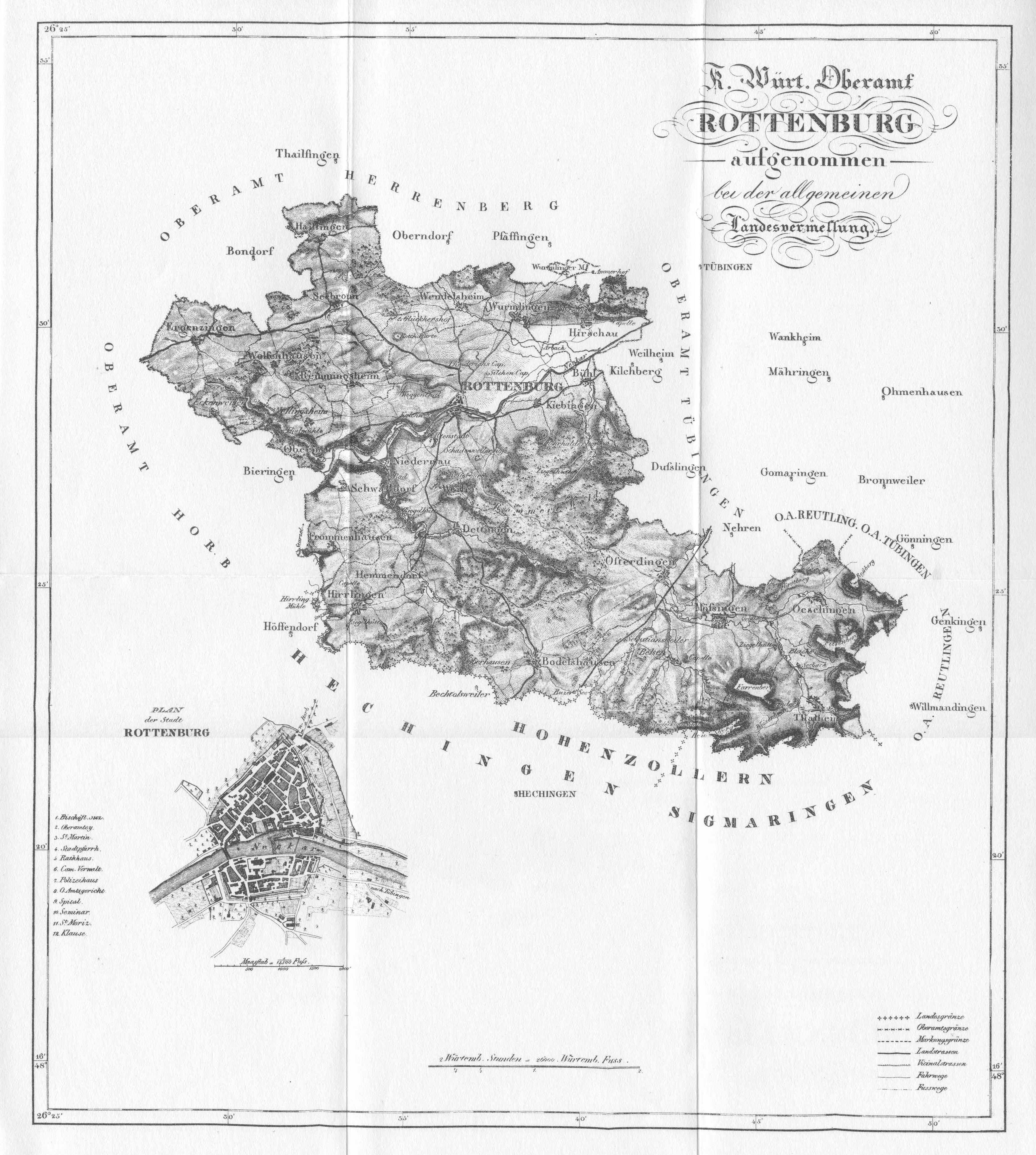 Beschreibung des Oberamts Rottenburg